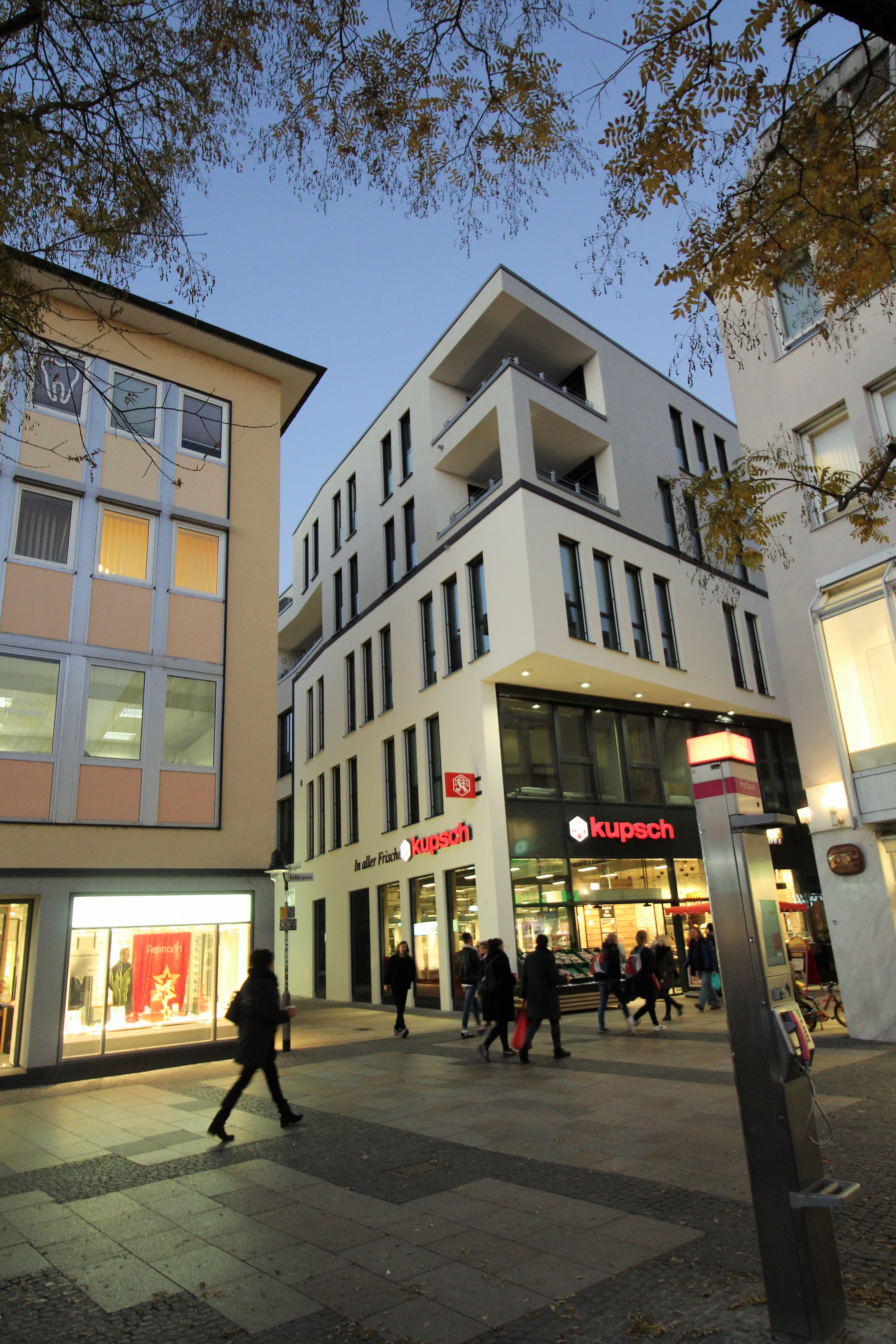 Das neue Gebäude auf dem Krönleinareal am Georg-Wichtermann-Platz